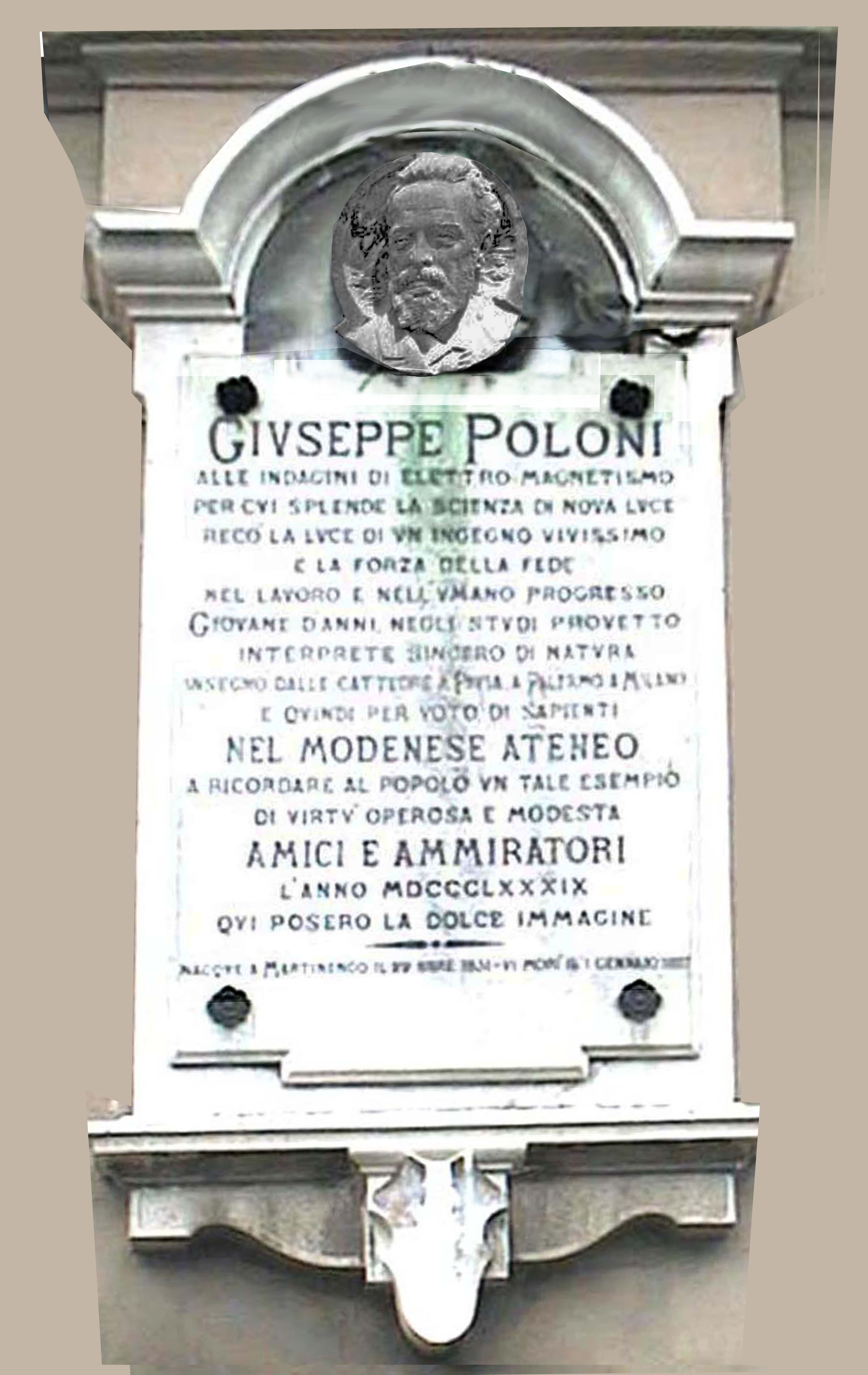 Lapide commemorativa del fisico Giuseppe Poloni